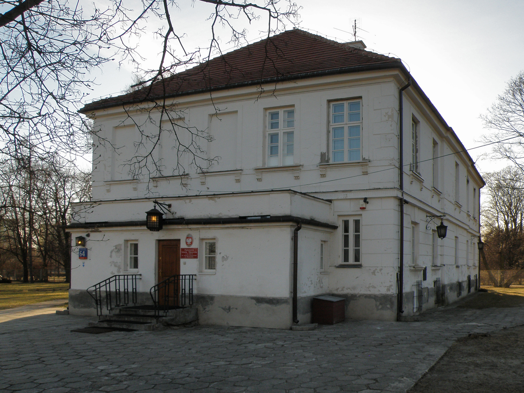 Dwór księcia Michała Poniatowskiego (Dworek Grochowski), Warszawa, Praga Południe